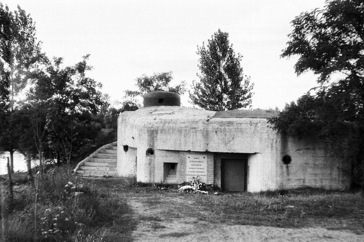 Schron żelbetowy nad rzeką Narew w rejonie Nowogrodu; stan w 1973 r.